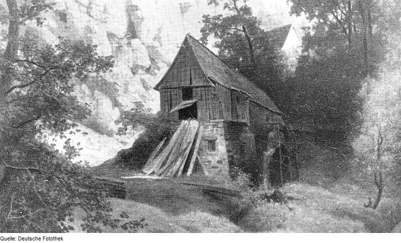 Original image description from the Deutsche FotothekDresden-Loschwitz. Brettschneidemühle im Loschwitzgrund, Ausschnitt aus: Gemälde von Eduard Leonhardi. Emil August Eduard Leonhardi (* 19. Januar 1828 in Freiberg; † 15. Juli 1905 in Dresden-Loschwitz) war ein deutscher Landschaftsmaler und Sohn des schnell zu Wohlstand gekommenen Dresdner Tintenfabrikanten August Leonhardi (1805–1865). Er erwarb 1879 die ausgediente, ehemaligen Hentschelmühle („Rothe Amsel“) im Dresdner Stadtteil Loschwitz und baute sie u.a. zu einem Atelier um.